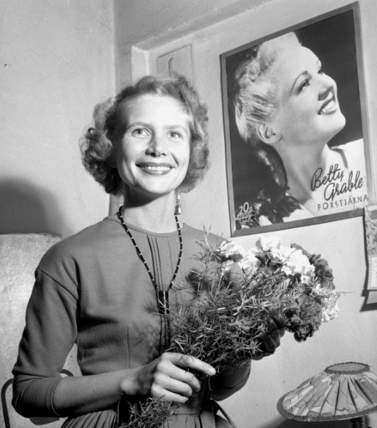 Den svenska skådespelaren Doris Svedlund 1955